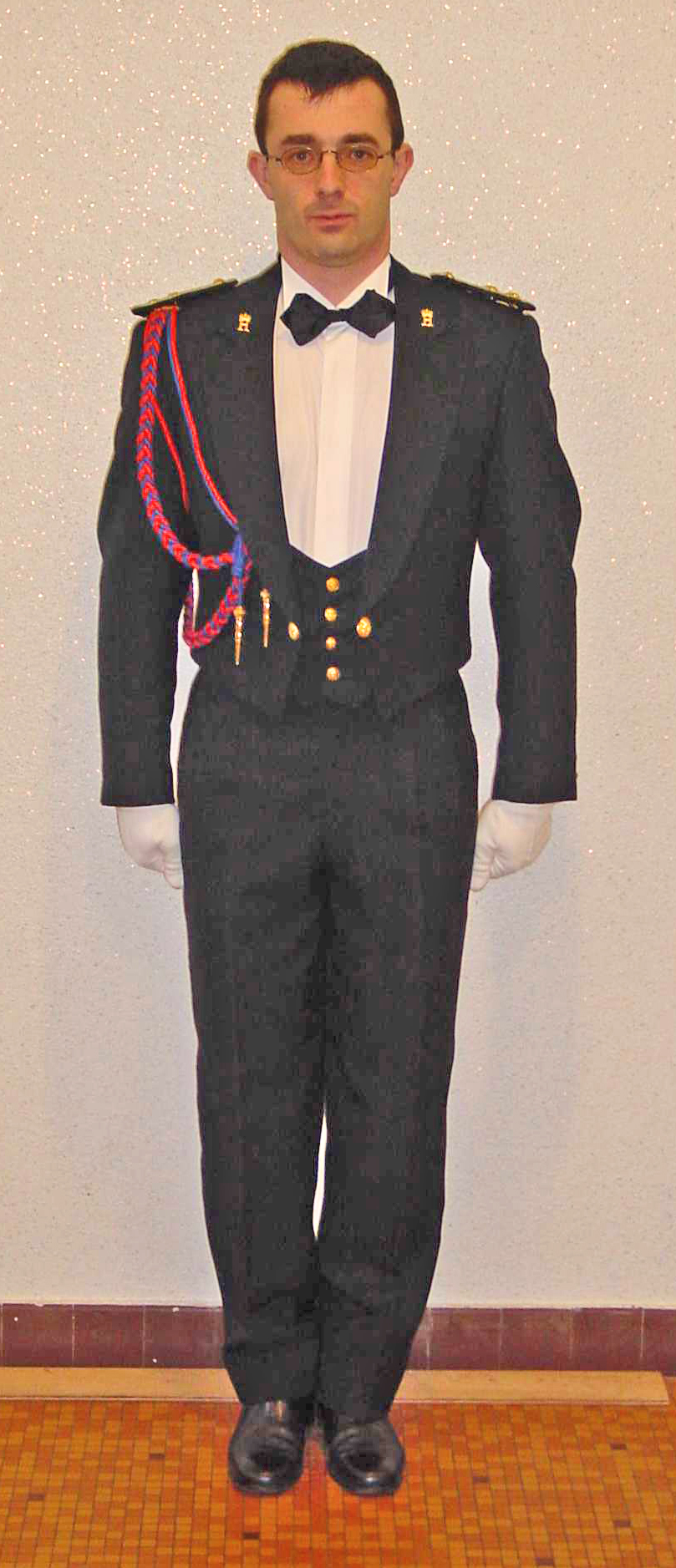 Lëtzebuerger Arméi Uniform Tenue G2bis